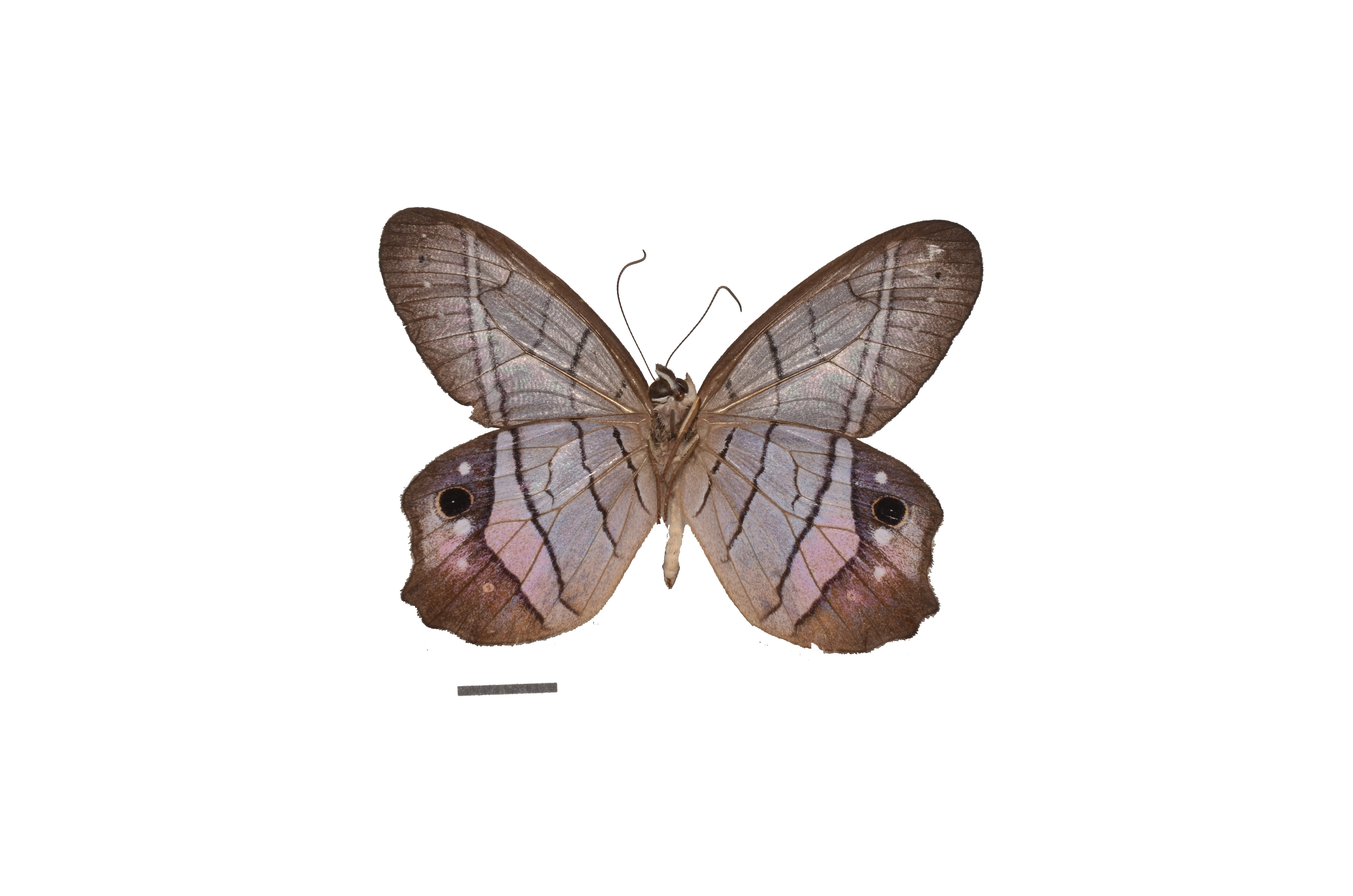 NE Costa Rica; ventral view